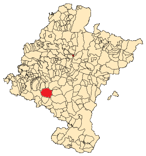 Mapa de Lerin